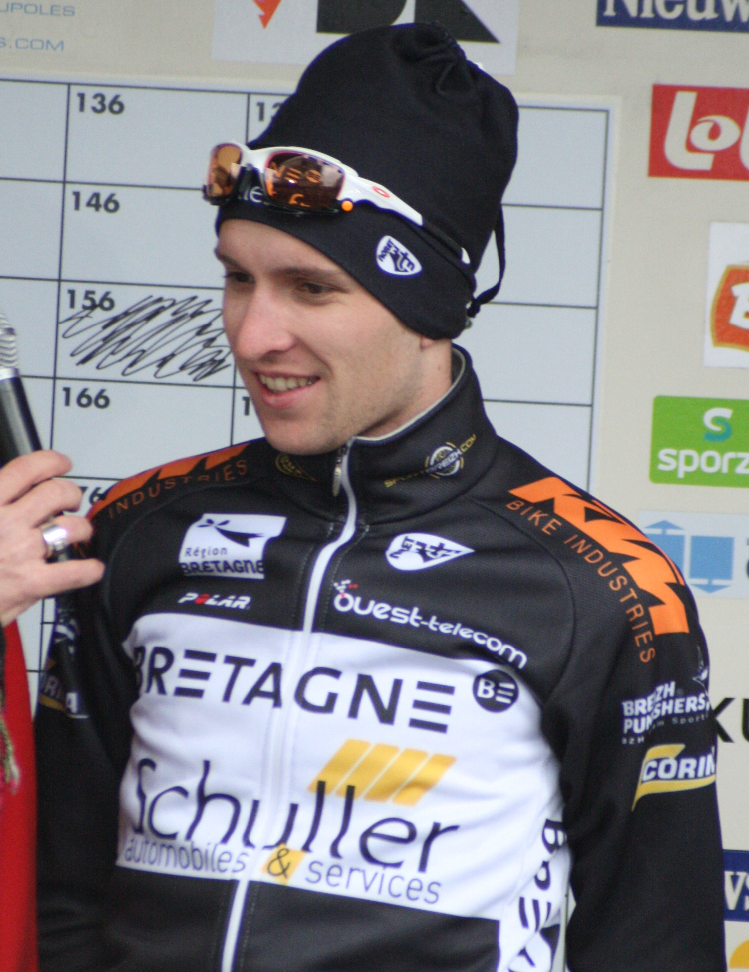 Kuurne-Bruxelles-Kuurne 2011, Laurent Pichon